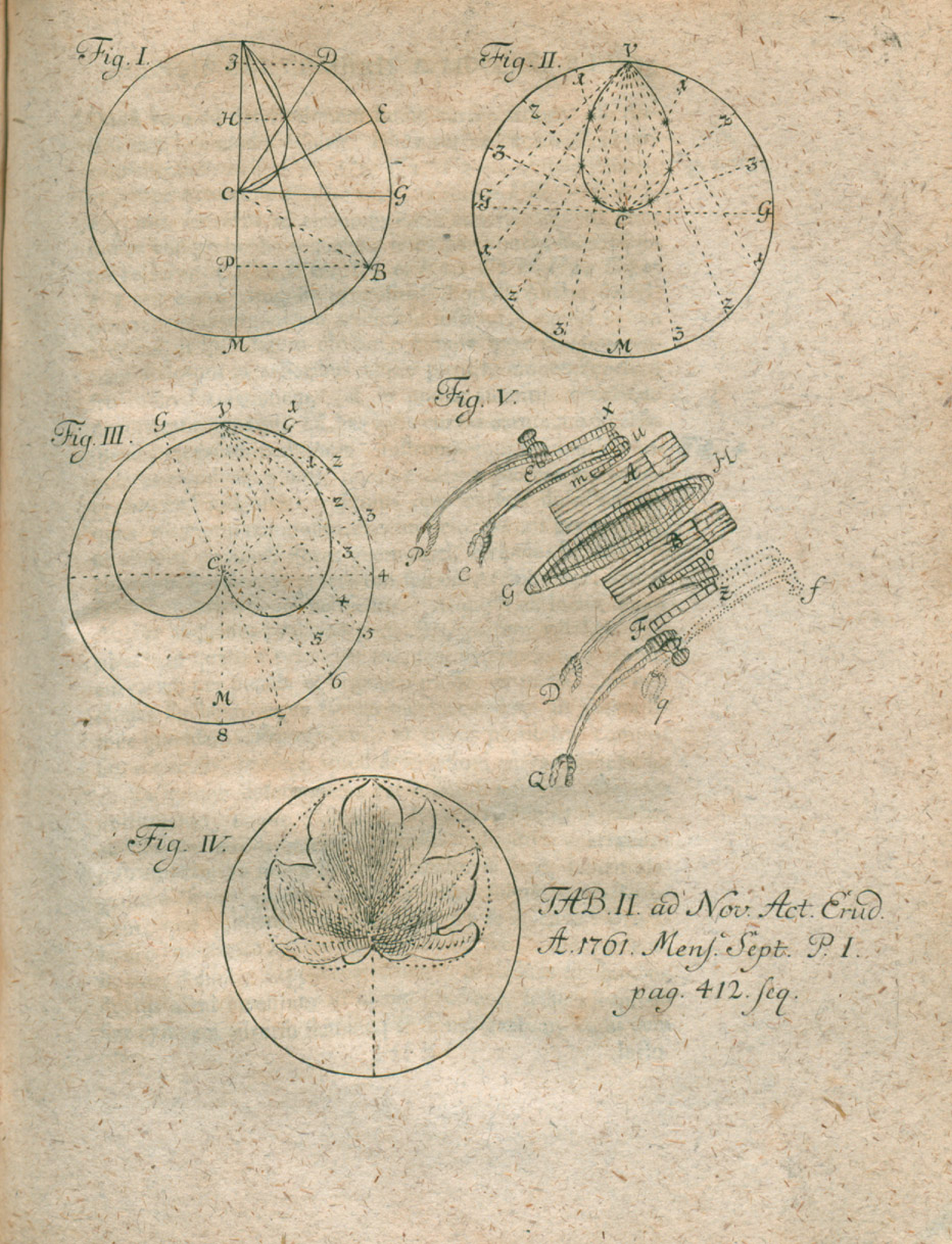 Illustration